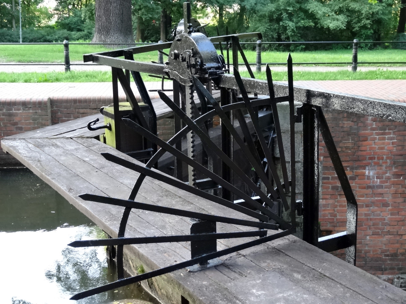 Śluza V przy ul. Czarna Droga w Bydgoszczy na Starym Kanale Bydgoskim